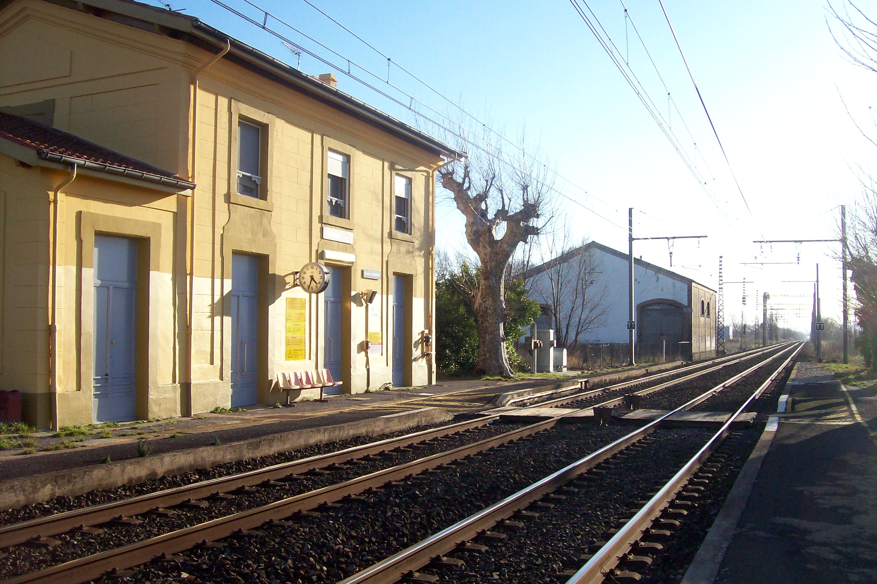 Coursan (Aude, France) - La gare et la halle de marchandise. Celle-ci est désafectée.